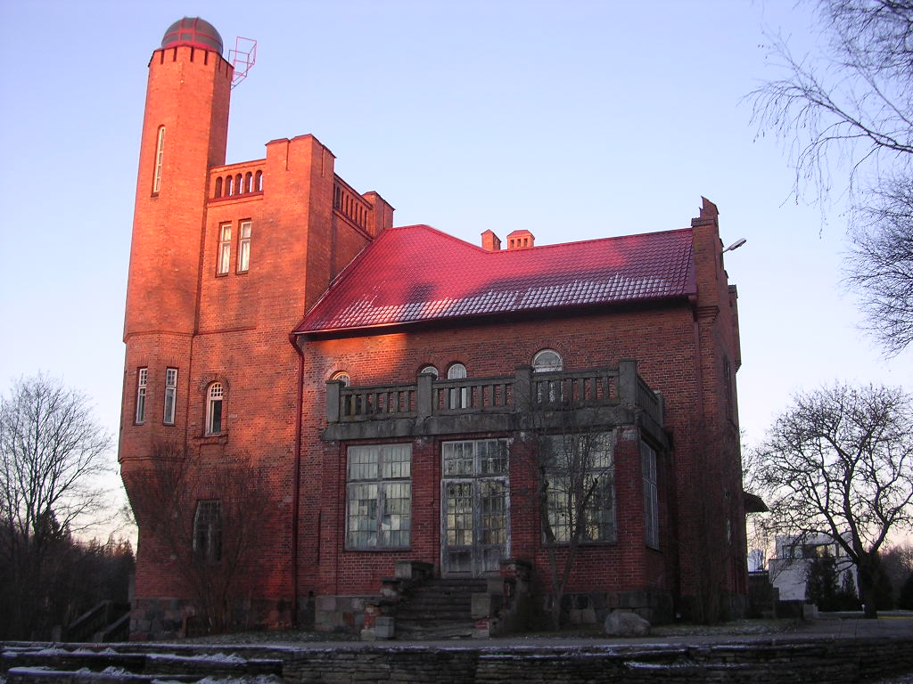 Jäneda mõis